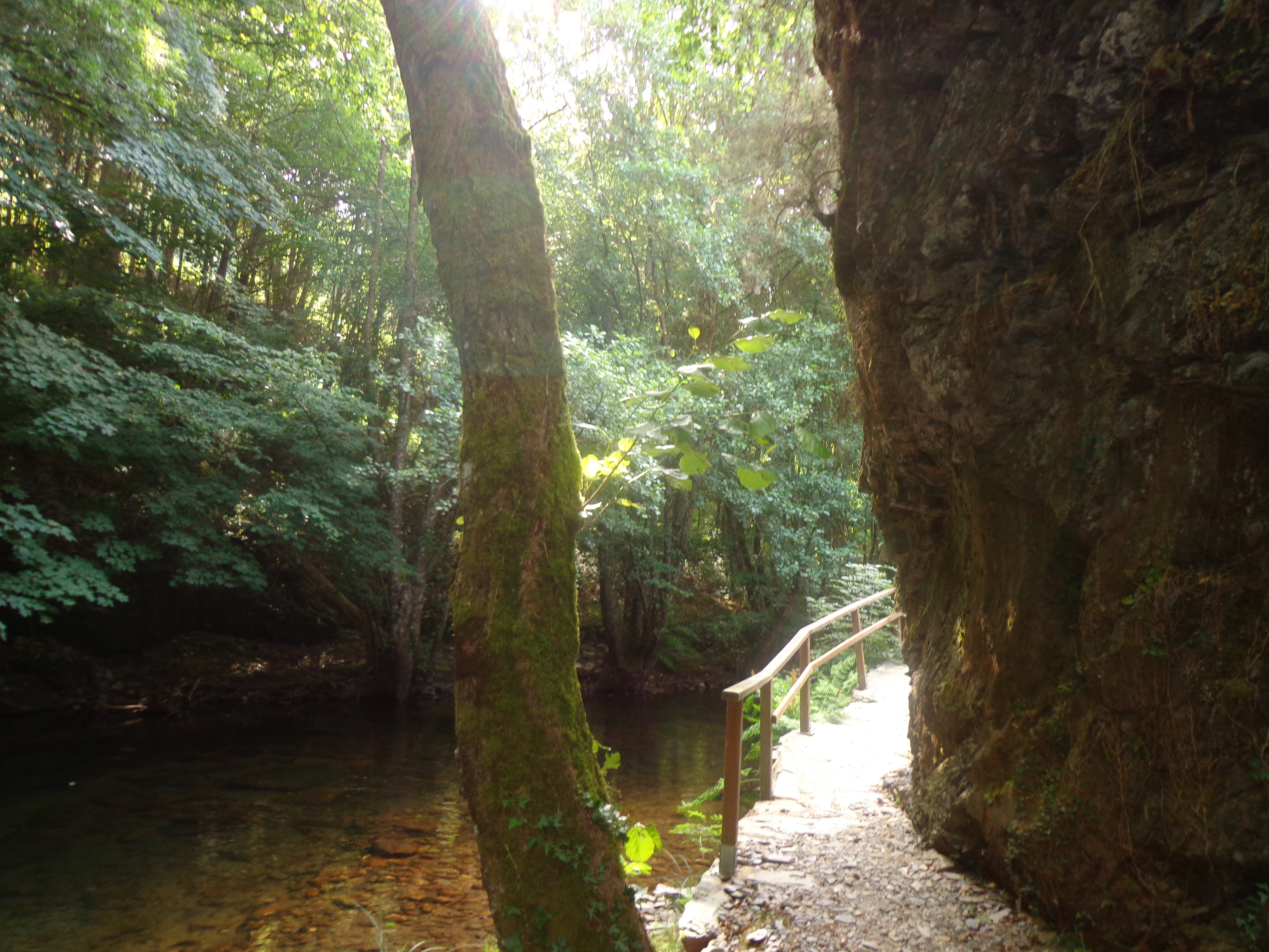 Paseo da Volta na Cortevella - Martín